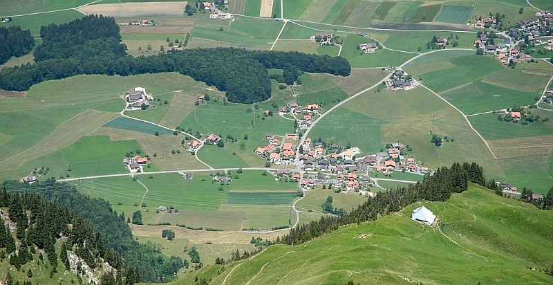 Gemeinde Oberstocken (Sicht vom Gipfel des Stockhorns); Rechts im Hintergrund ist ein Teil der Gemeinde Höfen zu sehen.